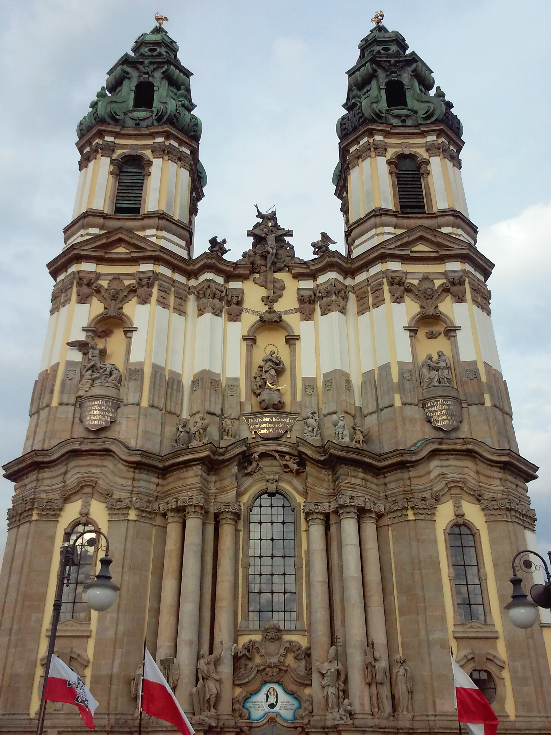 Krzeszów, bazylika Wniebowzięcia Najświętszej Maryi Panny